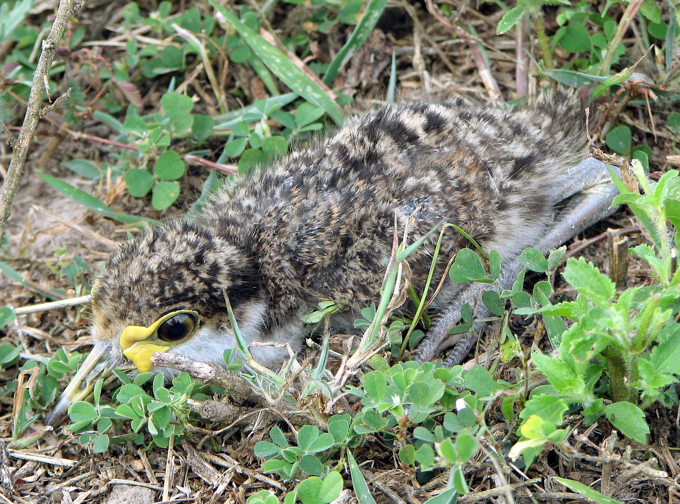 Vanellus miles, Young masked Lapwing